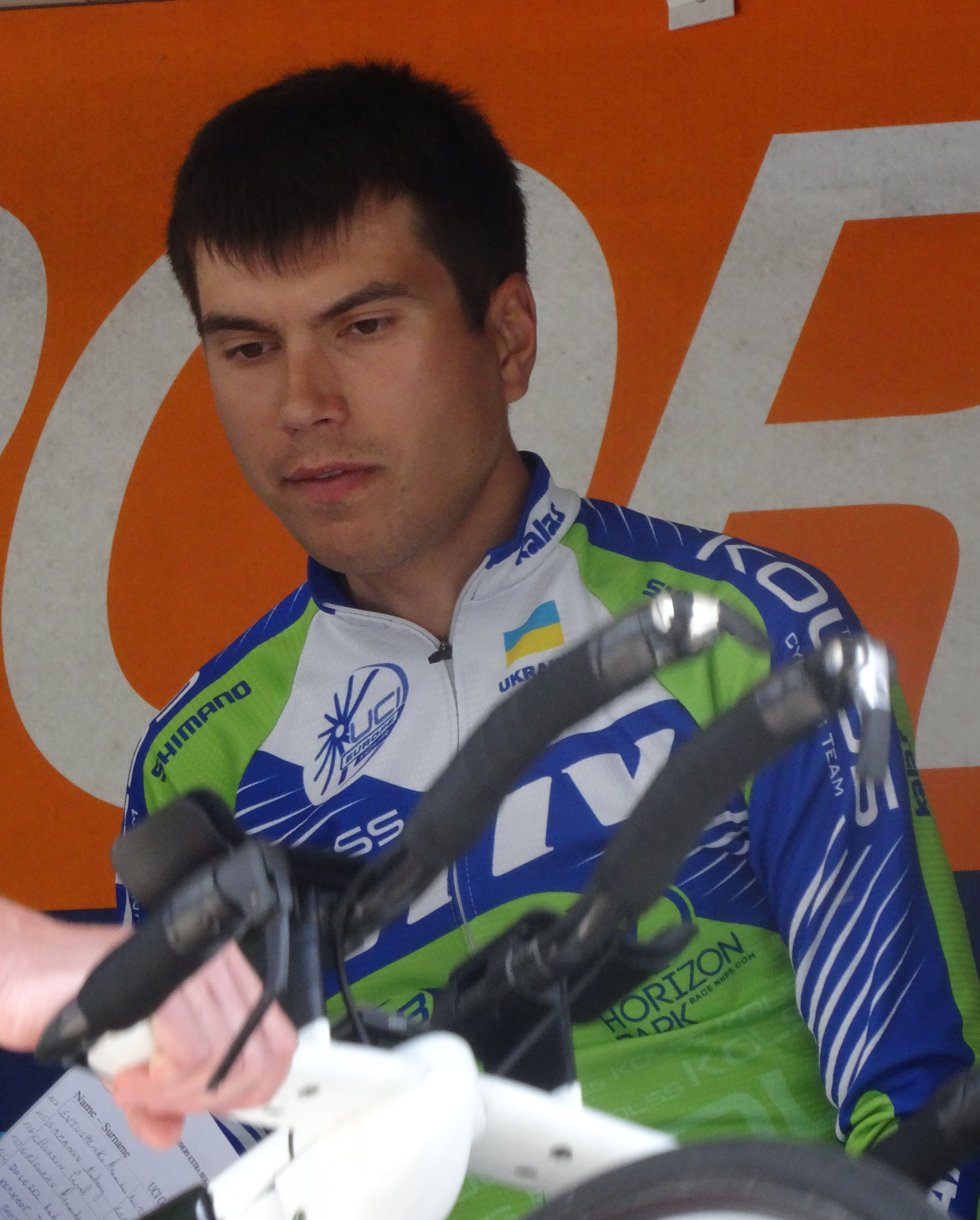 Reportage photographique réalisé le vendredi 23 mai 2014 à l'occasion du départ de la première étape du Paris-Arras Tour 2014 à Lens, Pas-de-Calais, Nord-Pas-de-Calais, France. Depicted person: Oleksandr Polivoda